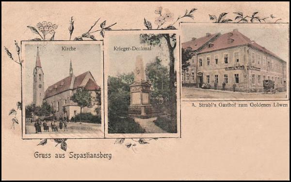 Kostel sv. Šebestiána, válečný pomník, hostinec U zlatých lvů